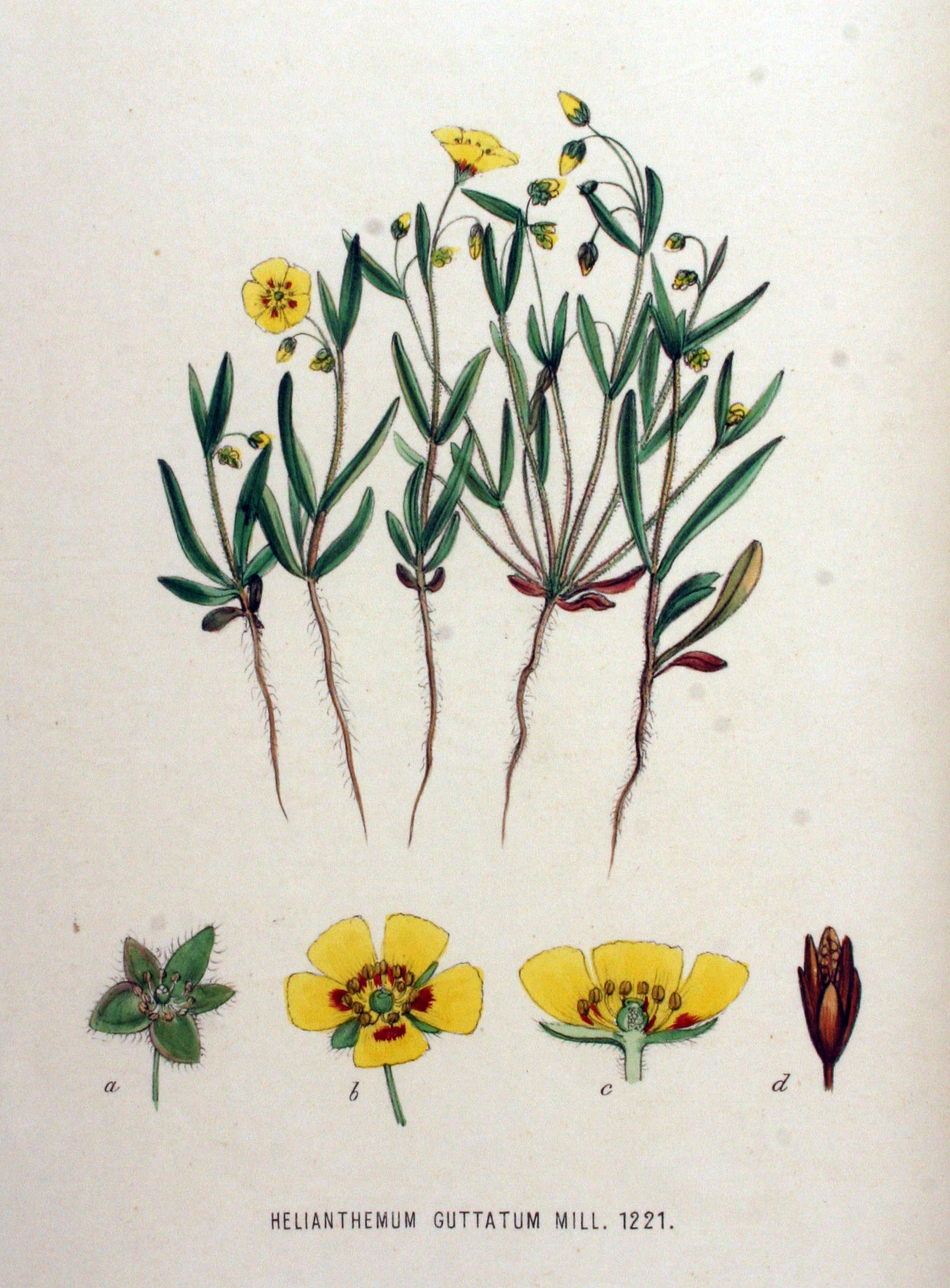 Tuberaria guttata (L.) Fourr. (Syn. Helianthemum guttatum (L.) Mill.)